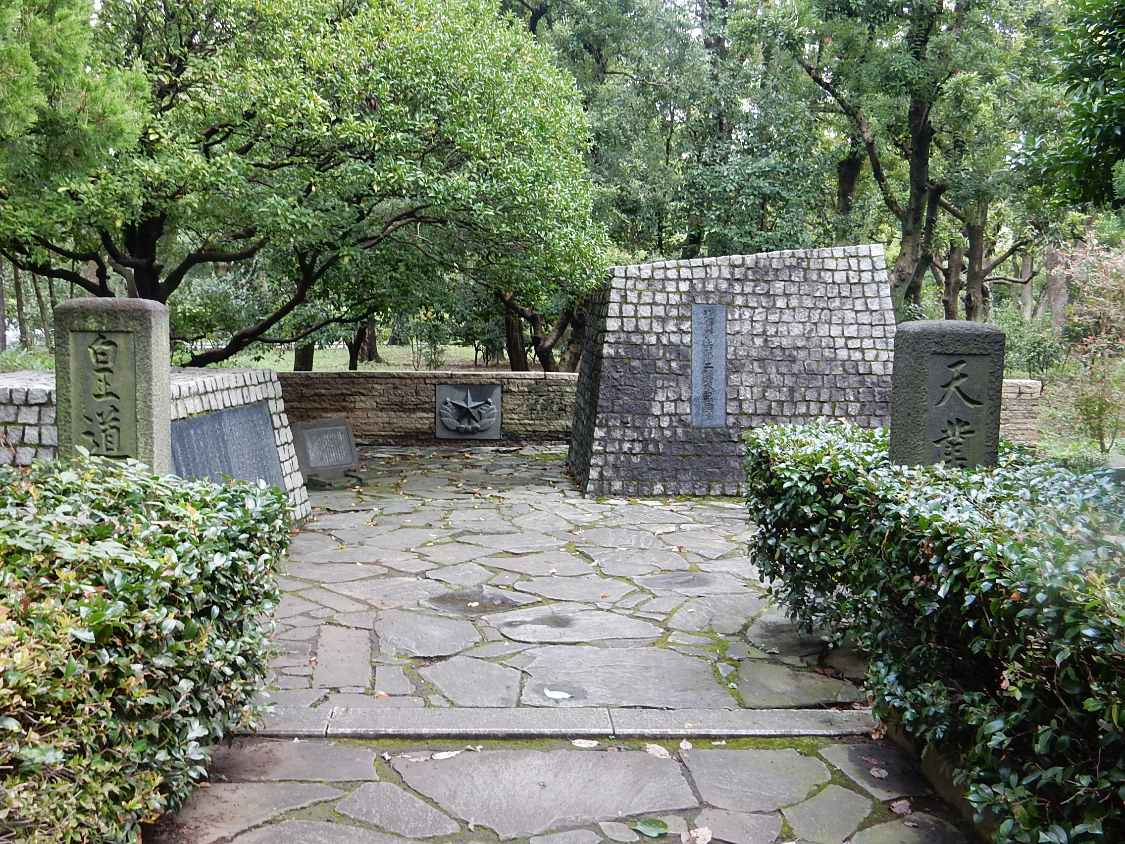 近衛歩兵第二聯隊の碑（北の丸公園内）